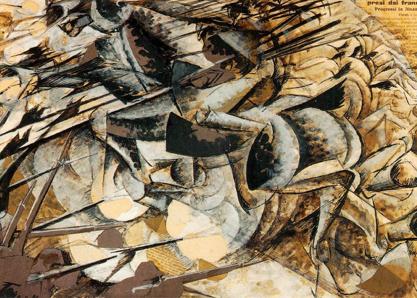 futurist painting